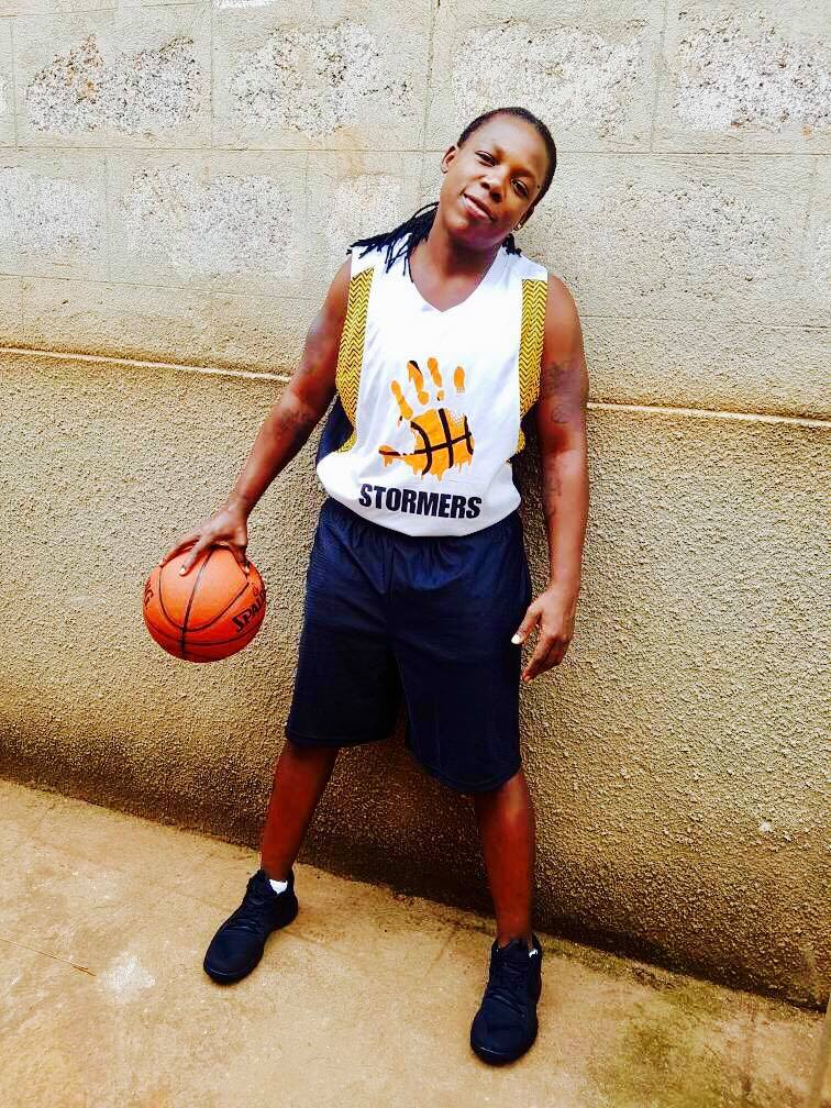 Jay Mulucha